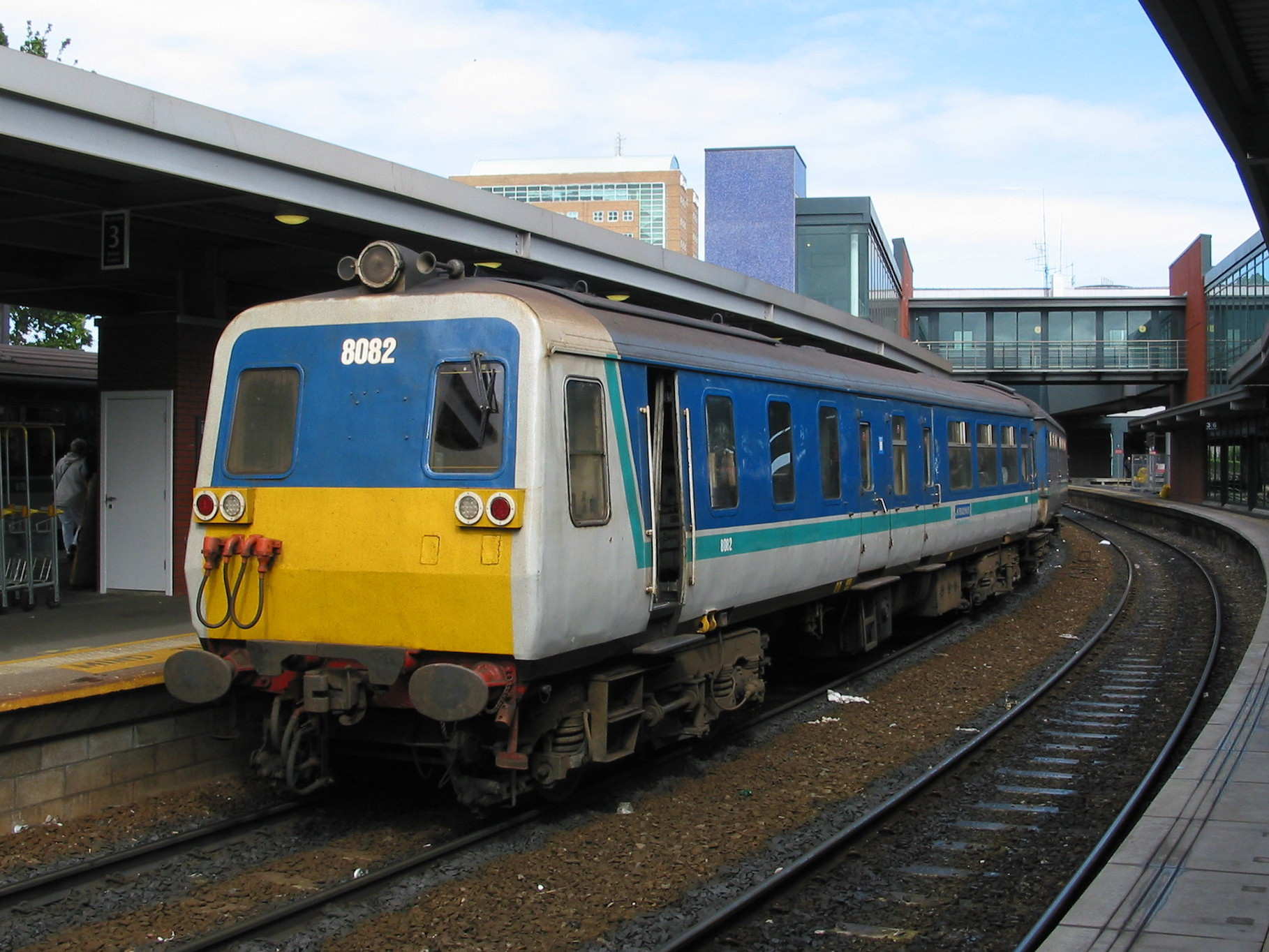 Northern Ireland Railways (NIR) 8082 im Bahnhof Belfast Central